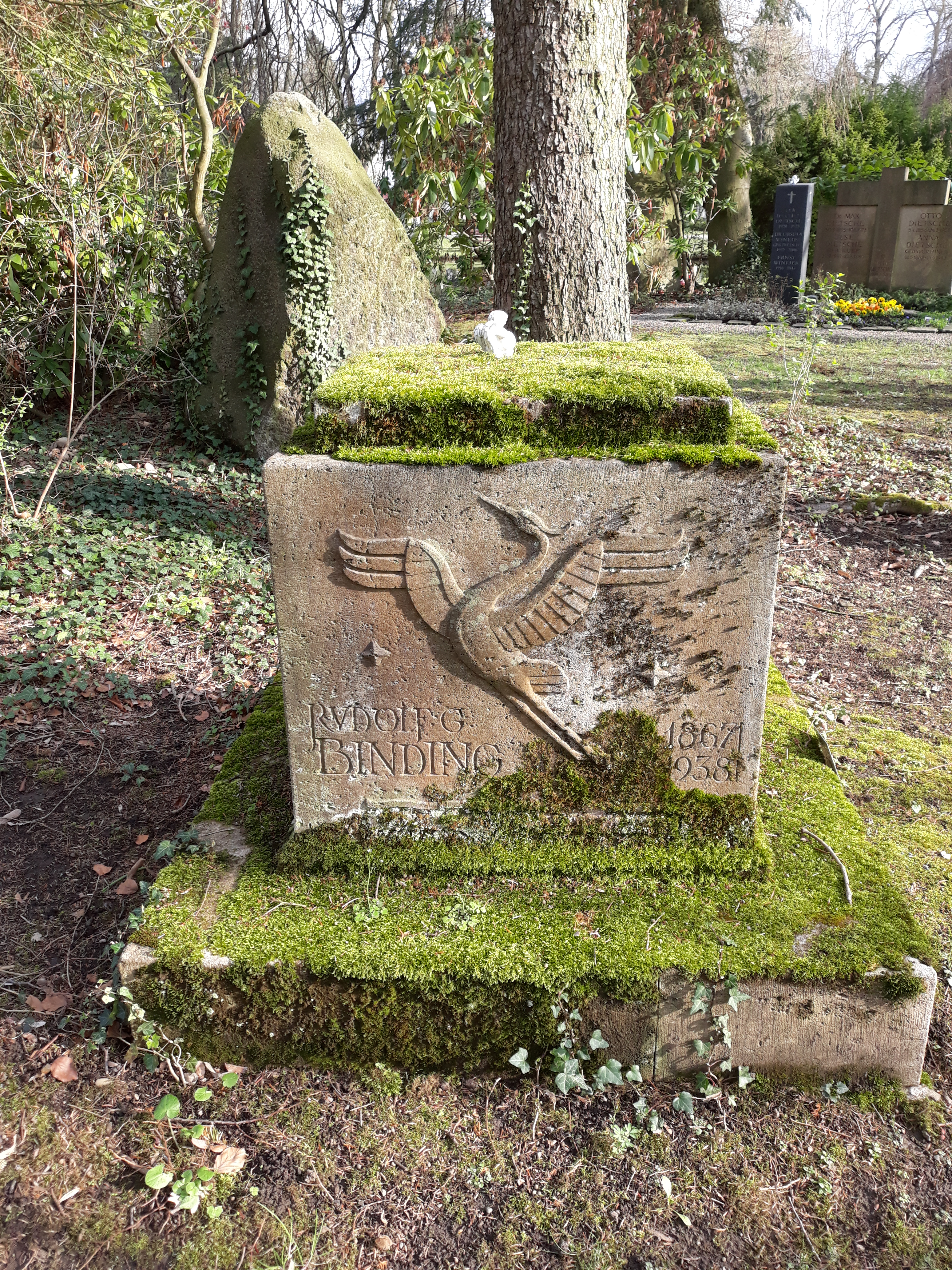 Der Grabstein des deutschen Dichters Rudolf G. Binding auf dem Hauptfriedhof Freiburg (Breisgau).